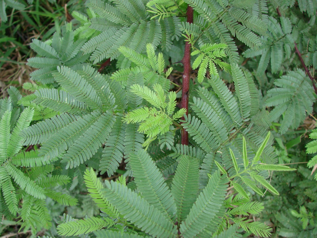 Mimosa tenuiflora (Wild.) Poir. - FABACEAE - BR 242 - Cristópolis - Bahia - Brasil.